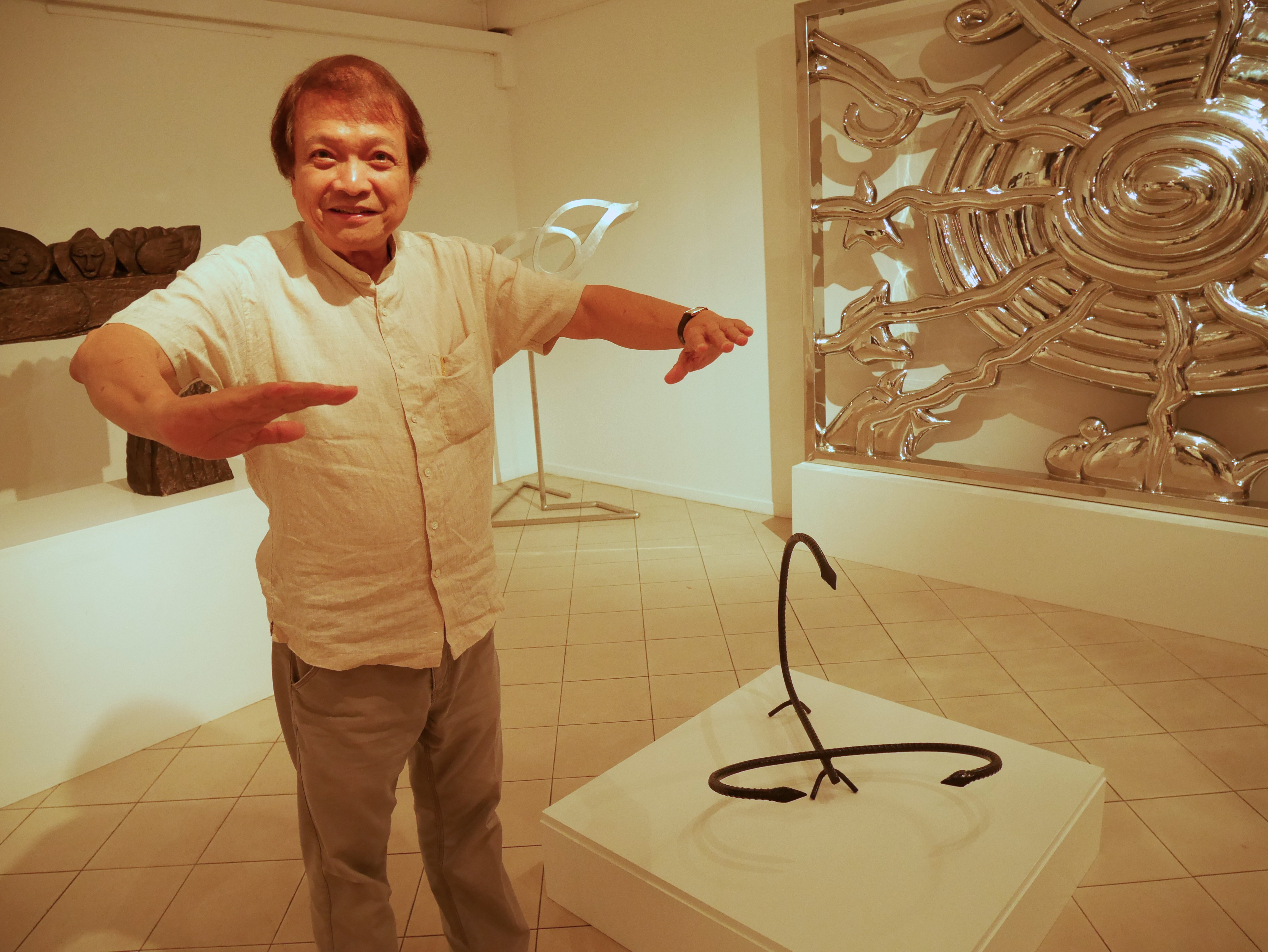 L'artiste devant sa sculpture d'un scorption (fer à béton).